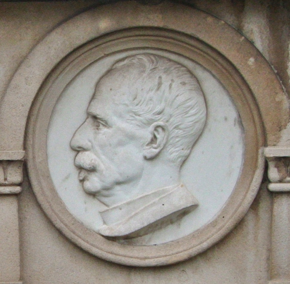 Emil Bassermann-Jordan (1835-1915), Bankier und Weingutsbesitzer, Portraitmedaillon vom Grab, Friedhof Deidesheim